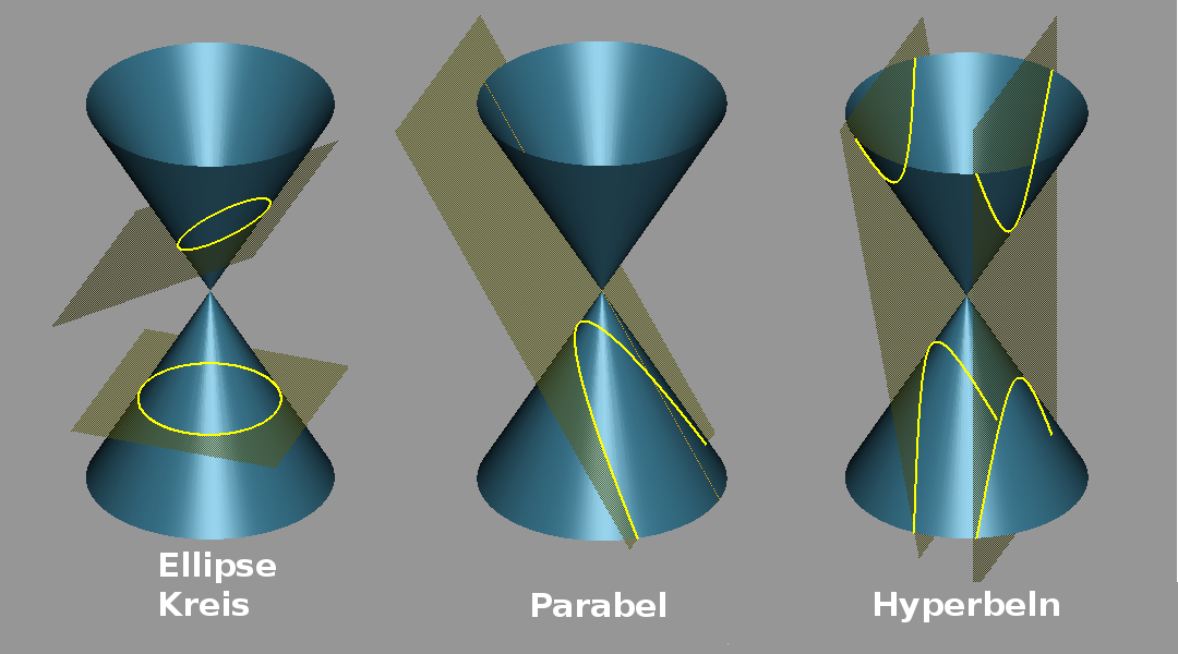 Kegelschnitte